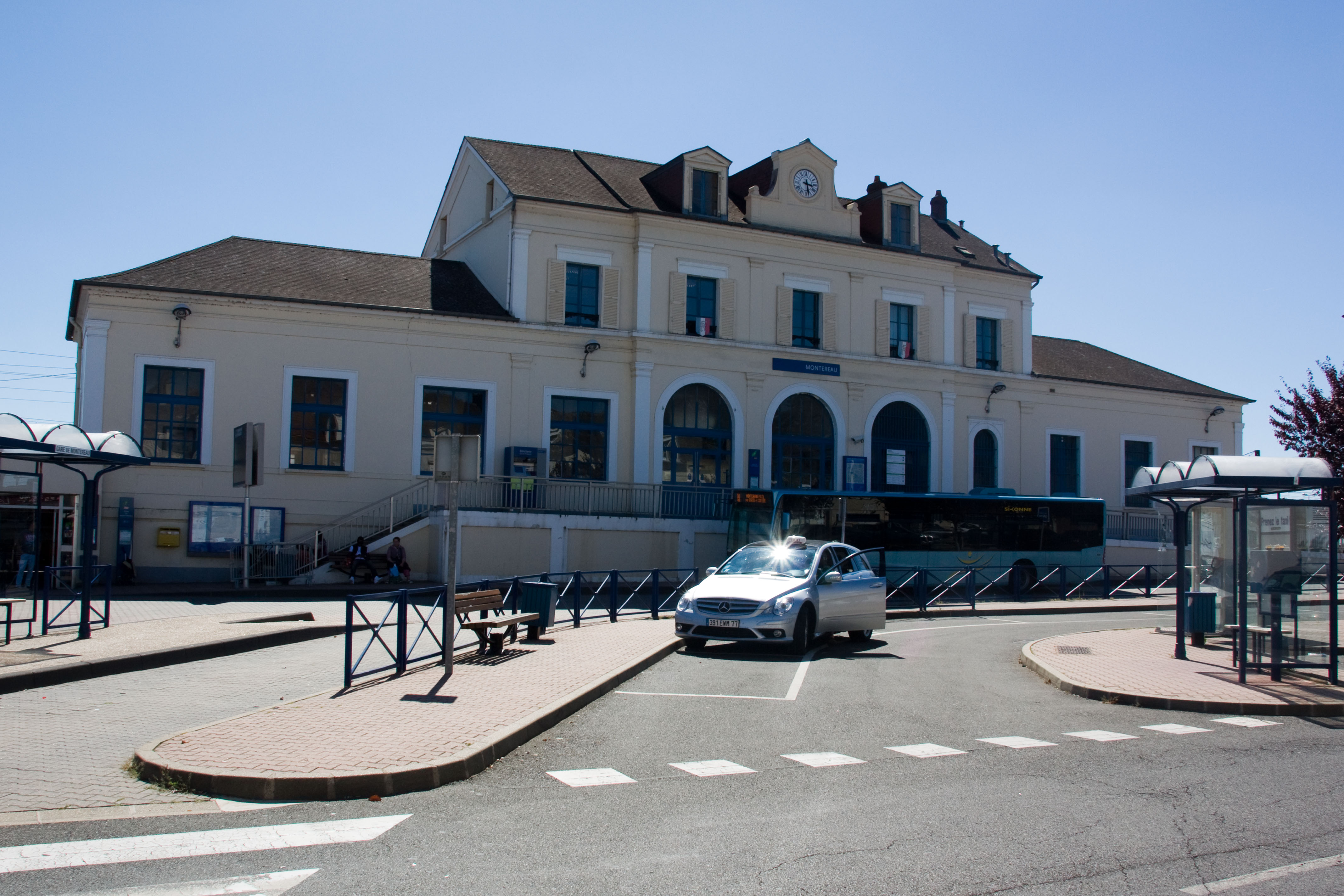 Gare de Montereau, Montereau, Seine-et-Marne, France